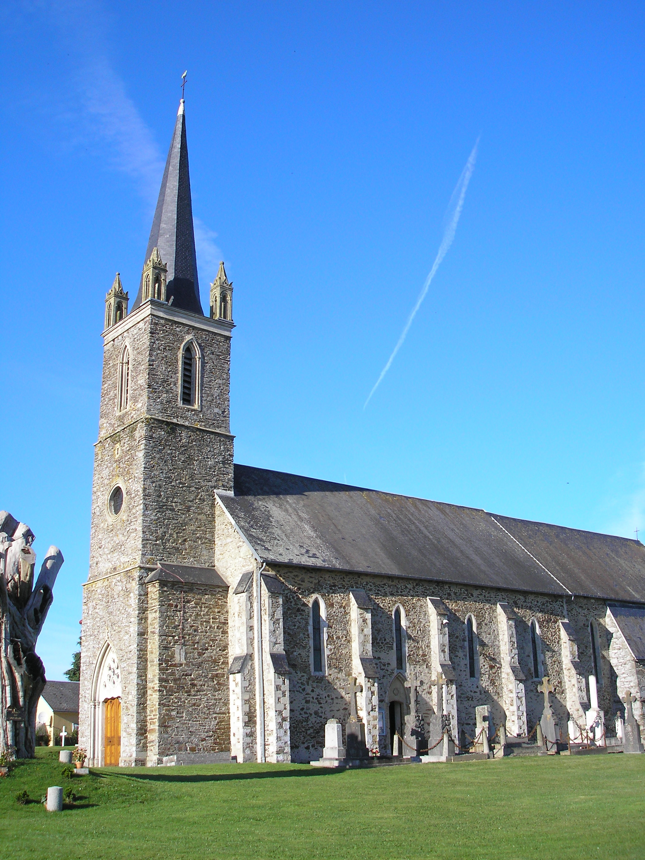 Baudre (Normandie, France). L'église.